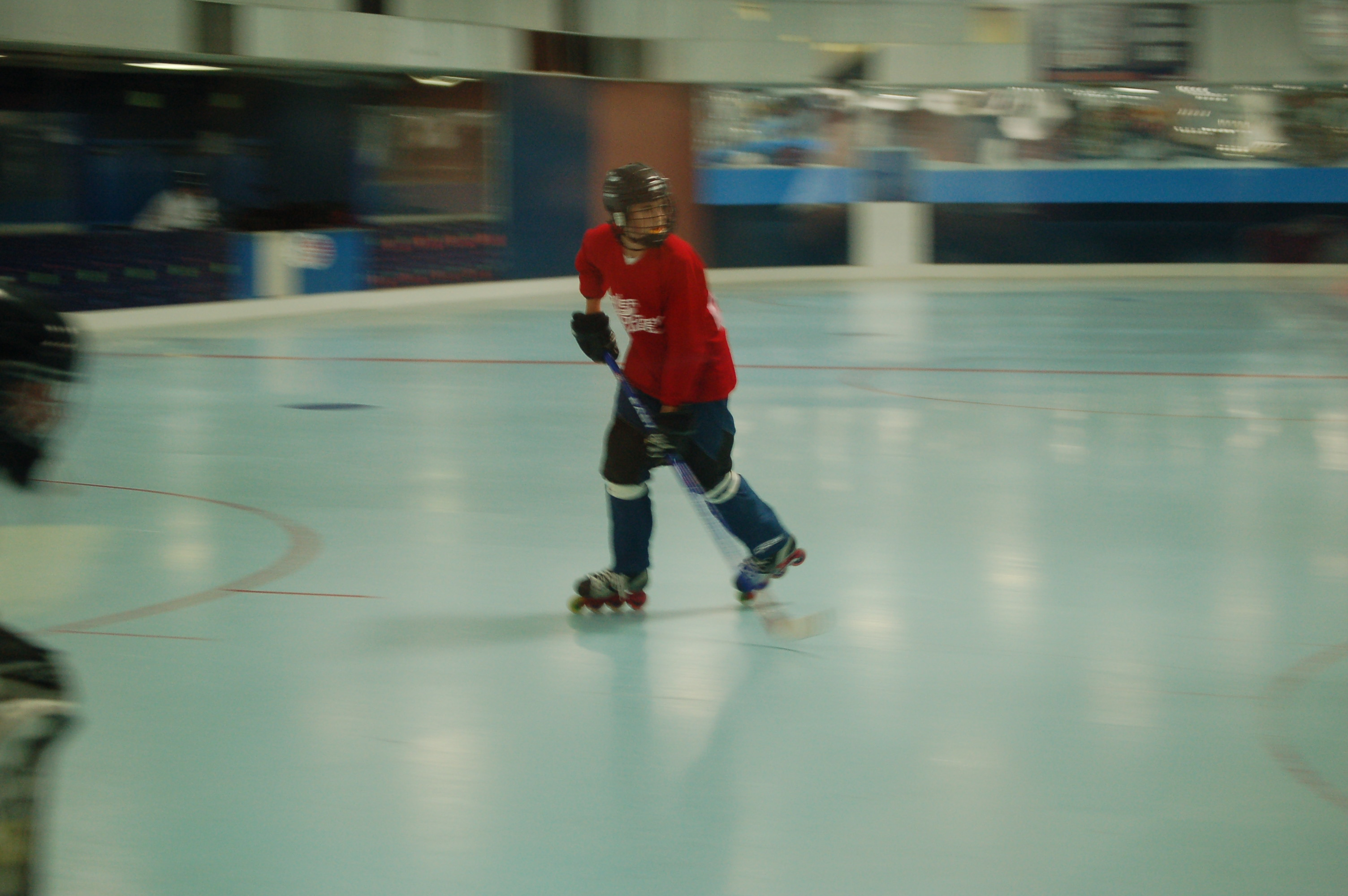 Inline Hockey at Albuquerque